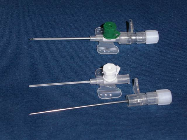 Venenverweilkanüle, offen und zusammengesetzt